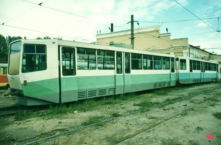 Трамваи КТМ-11 на территории трамвайного депо №2 в Волгограде